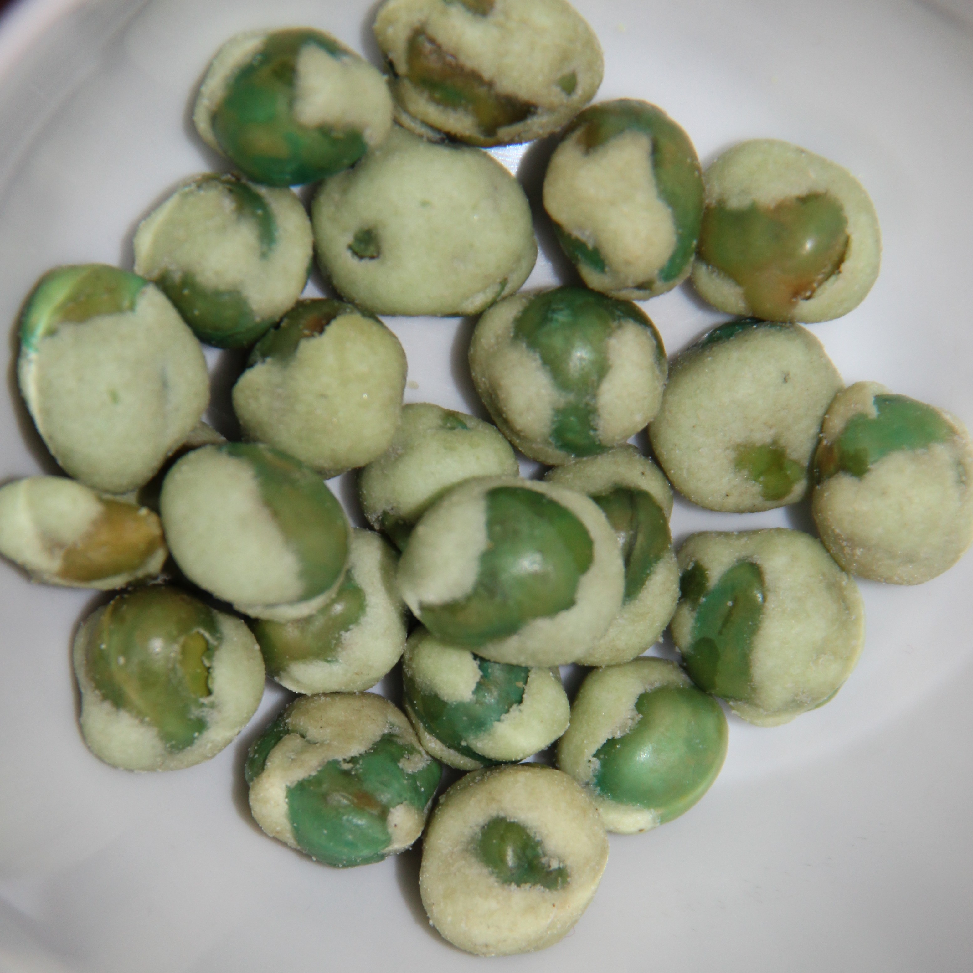 Pois au wasabi.